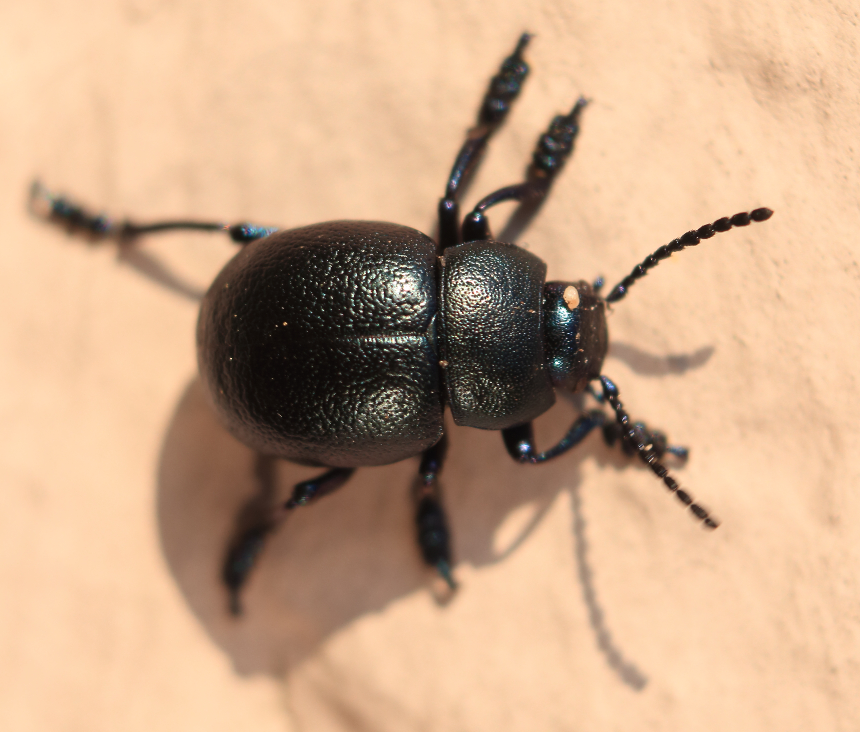 Tatzenkäfer, Timarcha goettingensis, ca. 10mm, gefunden im Sonnenschein an Hauswand Der abgebildete Käfer wurde am 20. März 2016 von Lennart auf kerbtier.de bestimmt, auf Grund meiner (Norbert) Anfrage dort vom 19. März 2016 The bug shown here has been identified from Lennart on kerbtier.de 2016, March 20th, my (Norbert) question there dated 2016, March 19th